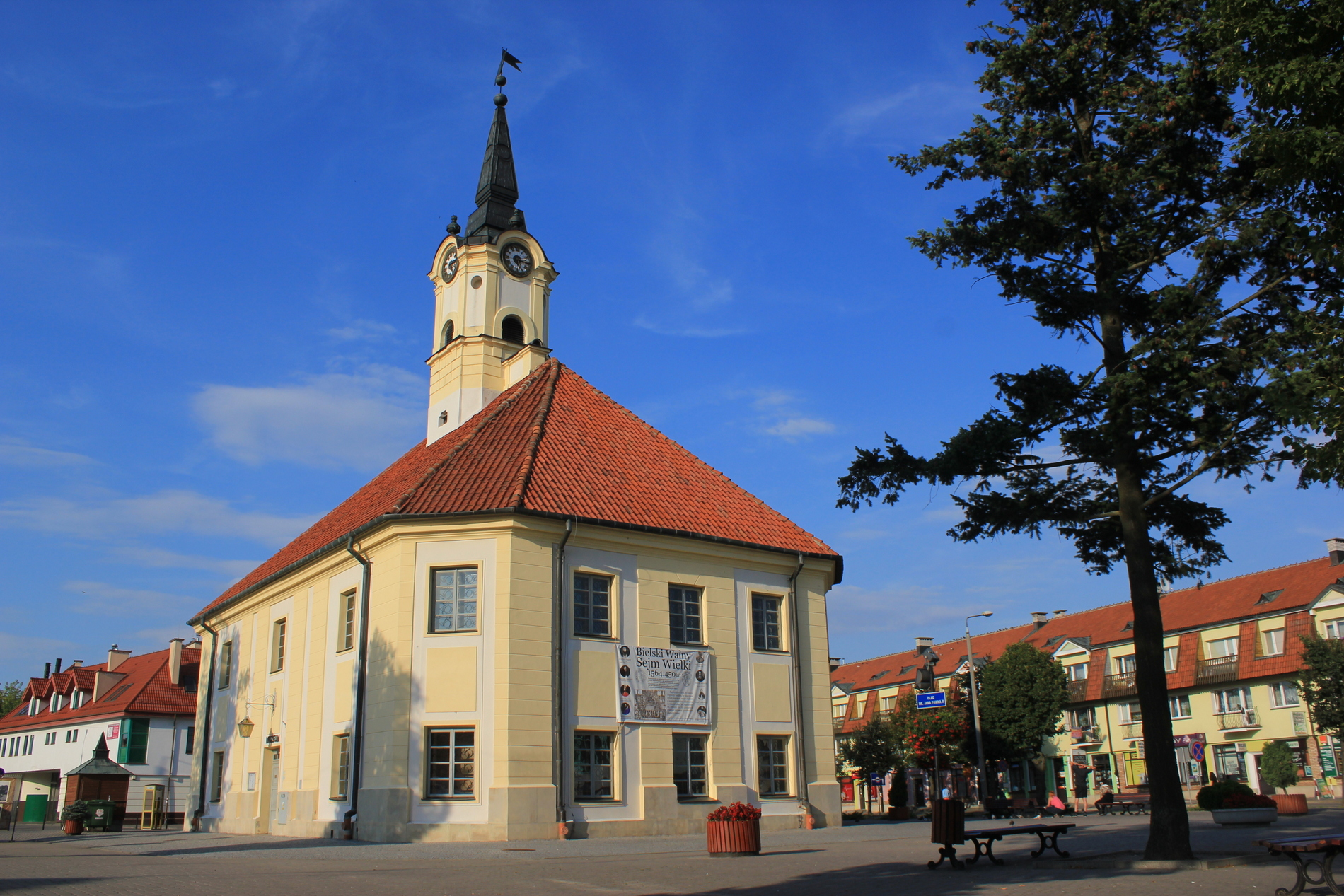 Hornjoserbsce: Radnica w Bielsku Podlaskim, Pólska.